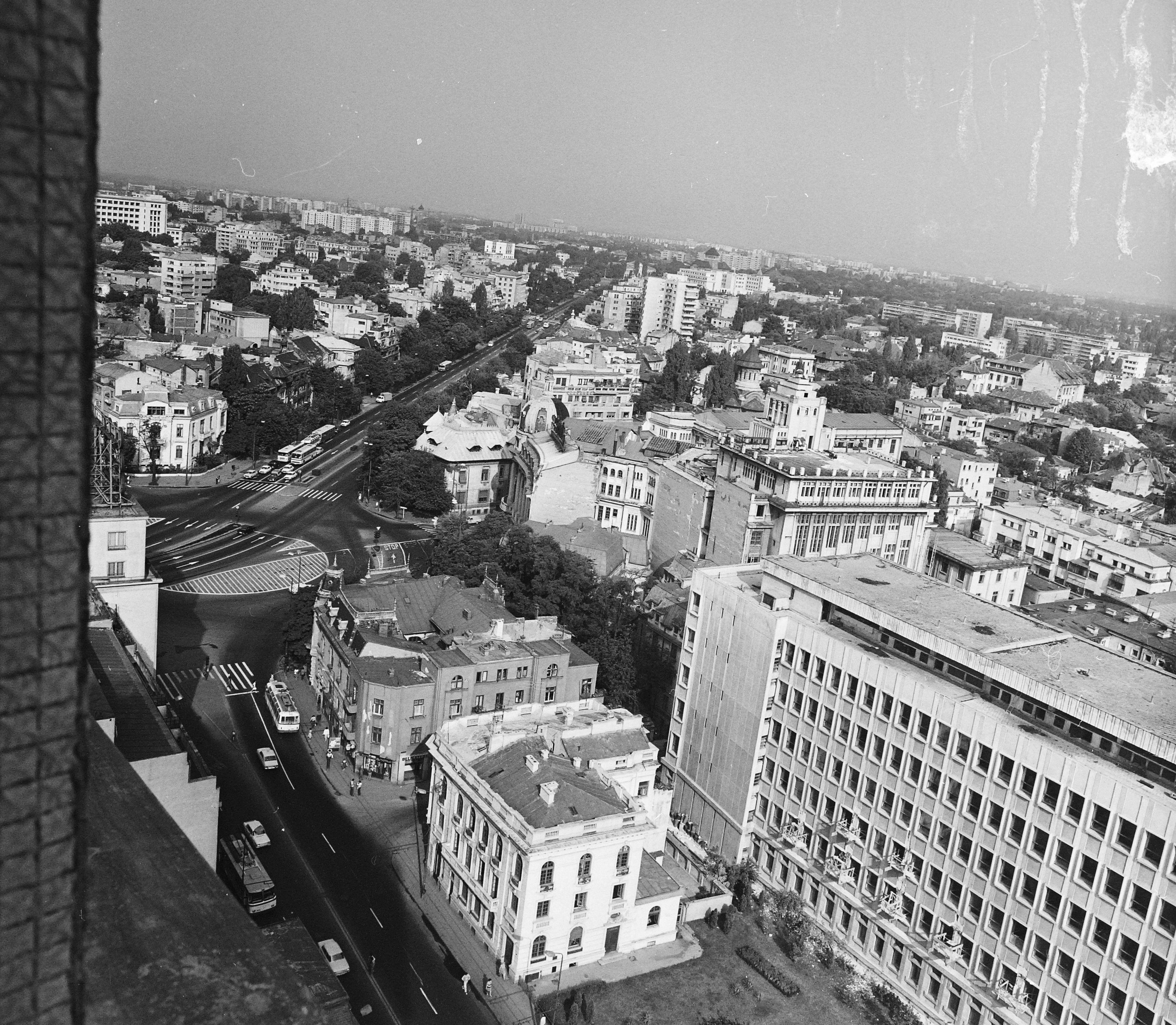 kilátás a Hotel Dorobantiból (ma Sheraton Bucharest Hotel) a Piata Romana felé. Location: Romania, Bucharest Tags: bird's eye view Title: kilátás a Hotel Dorobantiból (ma Sheraton Bucharest Hotel) a Piata Romana felé.